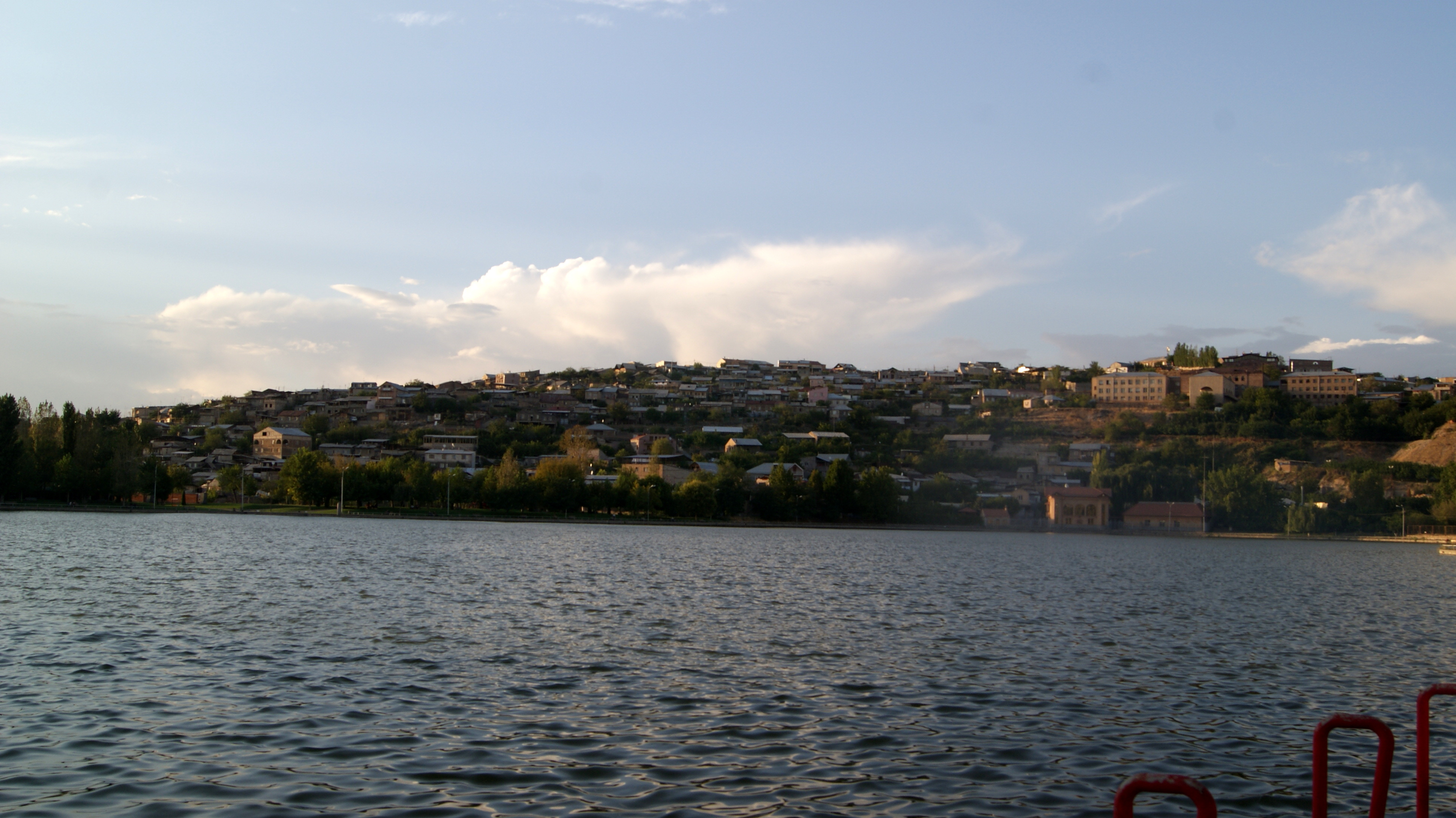 Վարդավառի լիճ 5/4